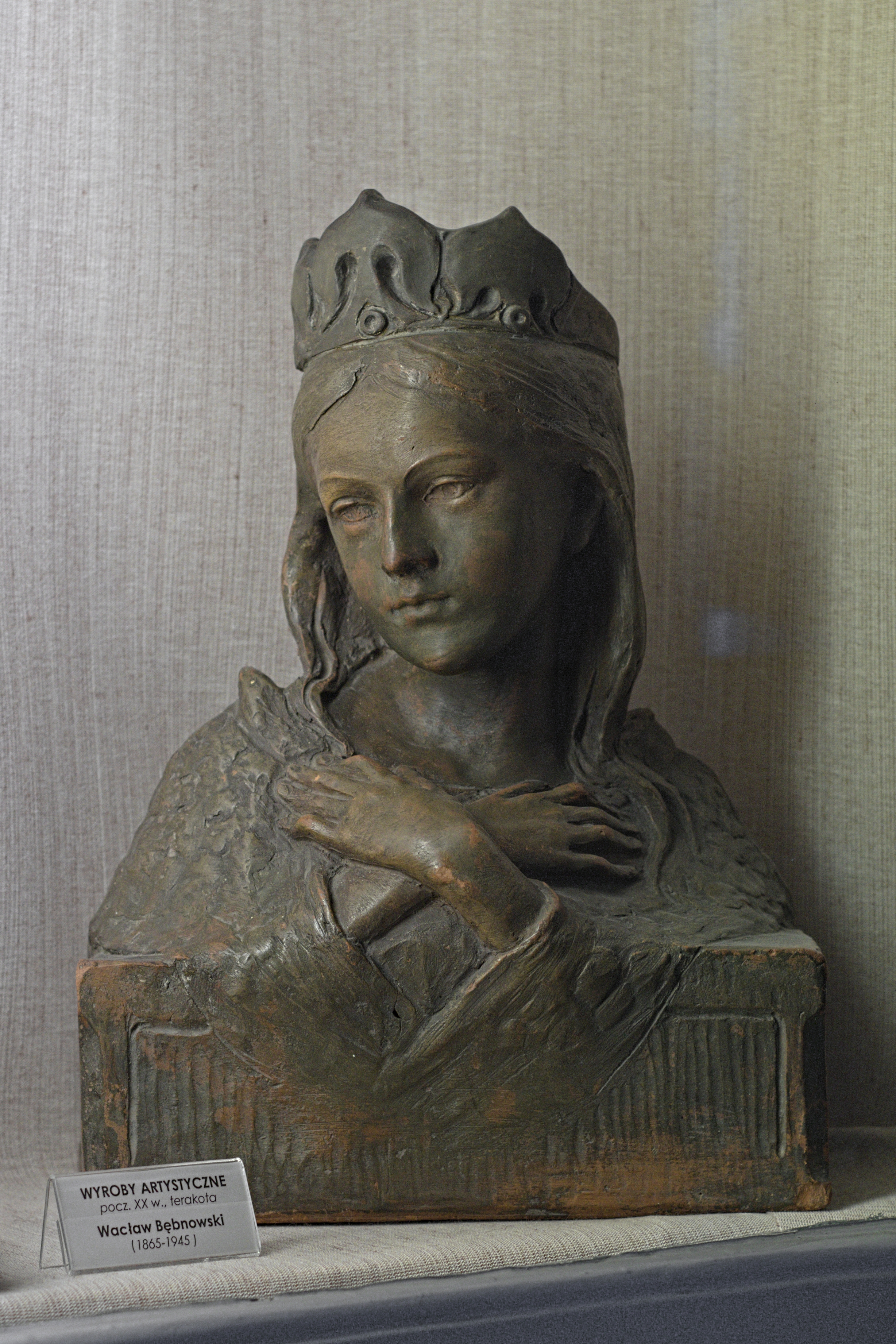 Święta Jadwiga Królowa, popiersie, terakota, autor: Wacław Bębnowski, powstałe na początku XX wieku, prawdopodobnie 1919; prezentowane na wystawie w Muzeum Porcelany w Wałbrzychu